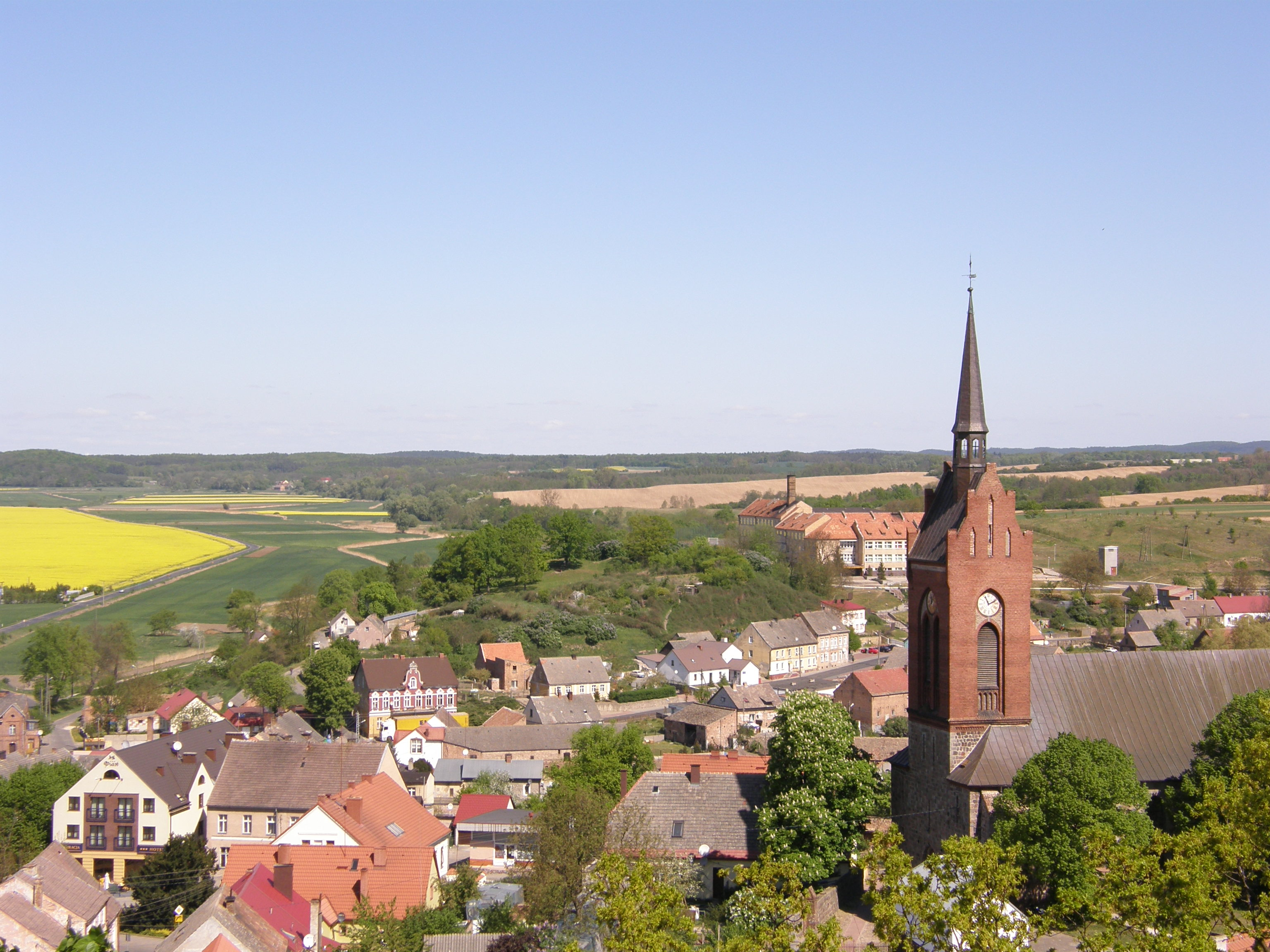 Cedynia - fragment miasta